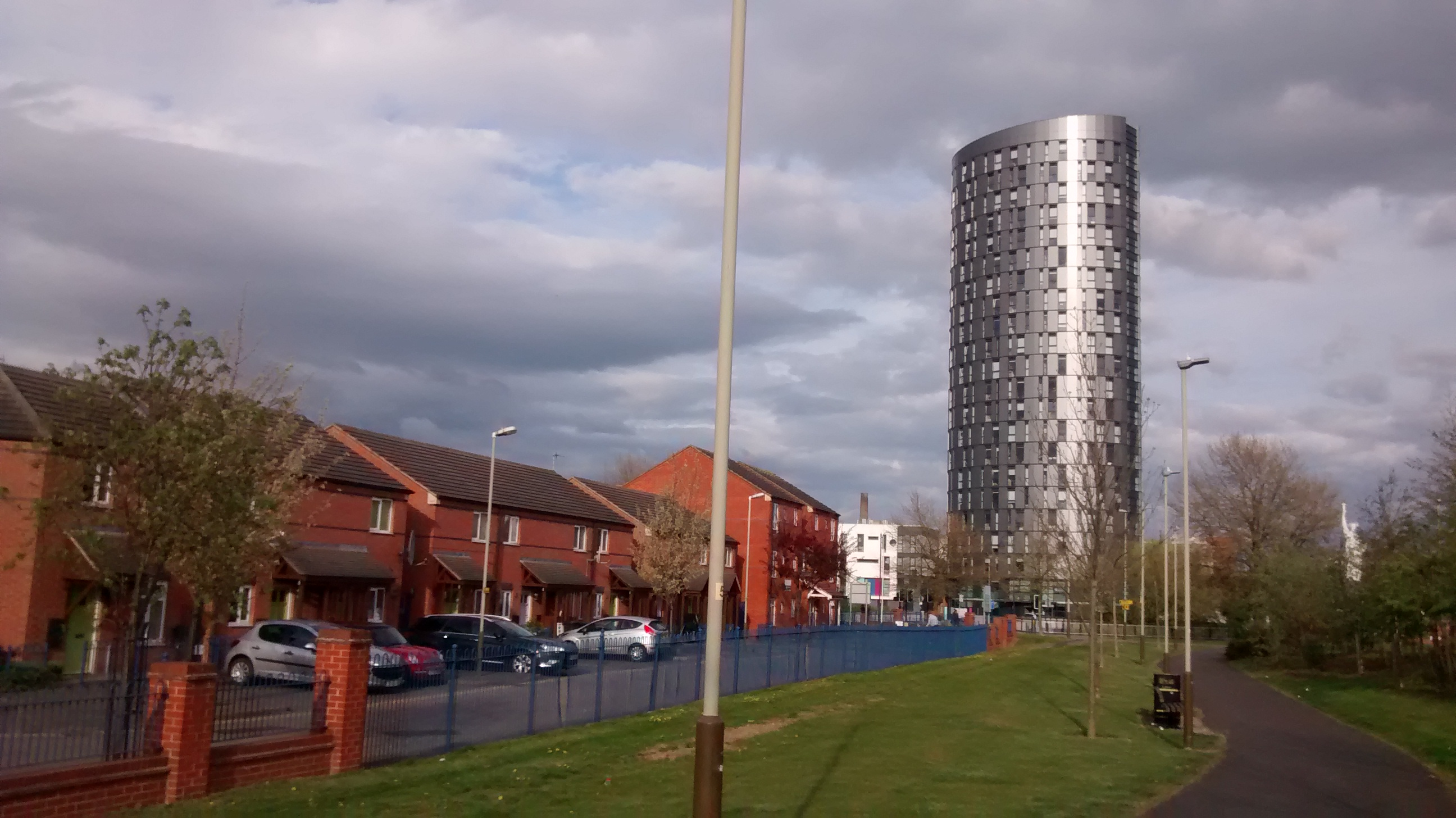 Eastern Boulevard Residential Tower